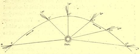 General direction of cometary tails